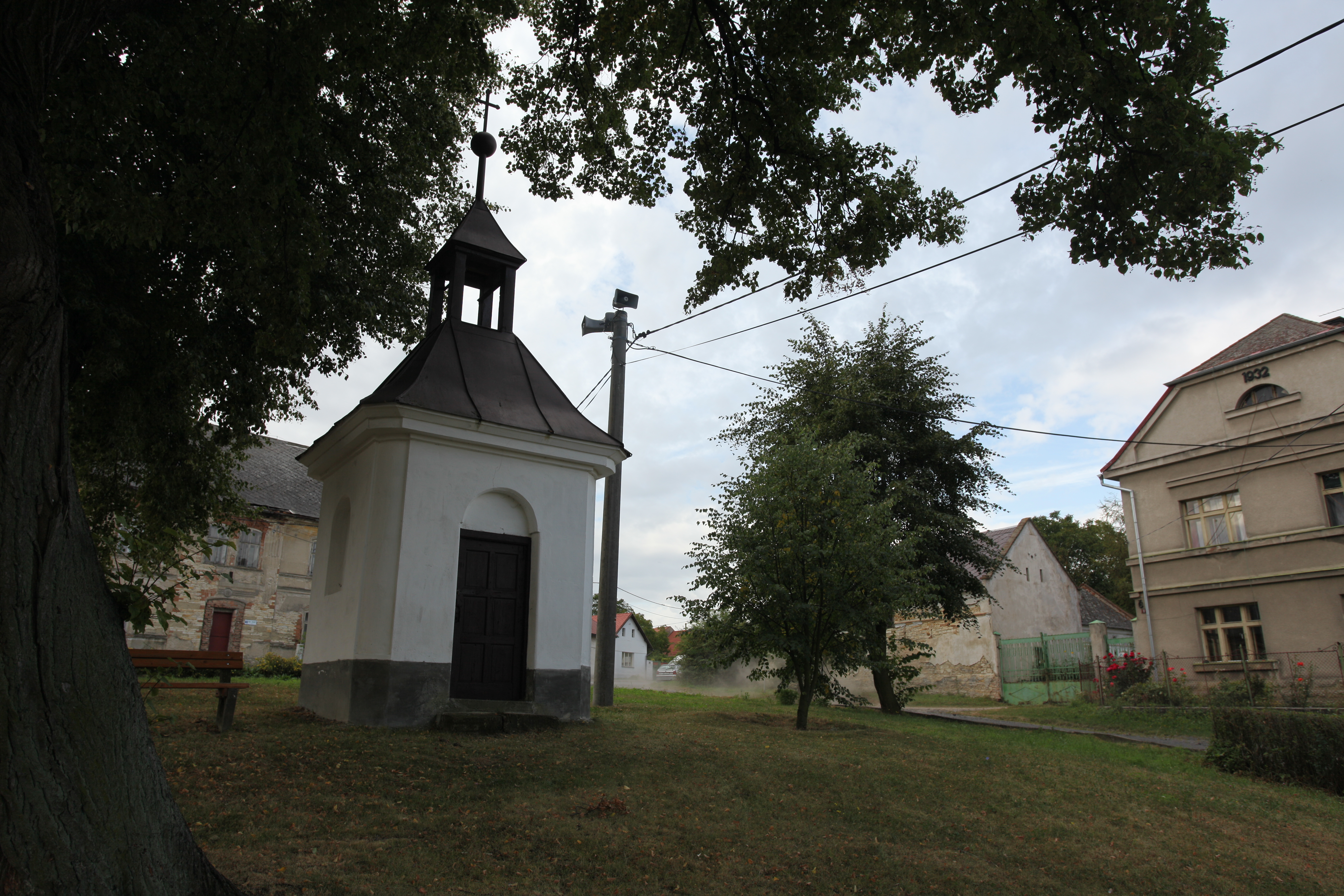 Slivínko, kaplička na návsi